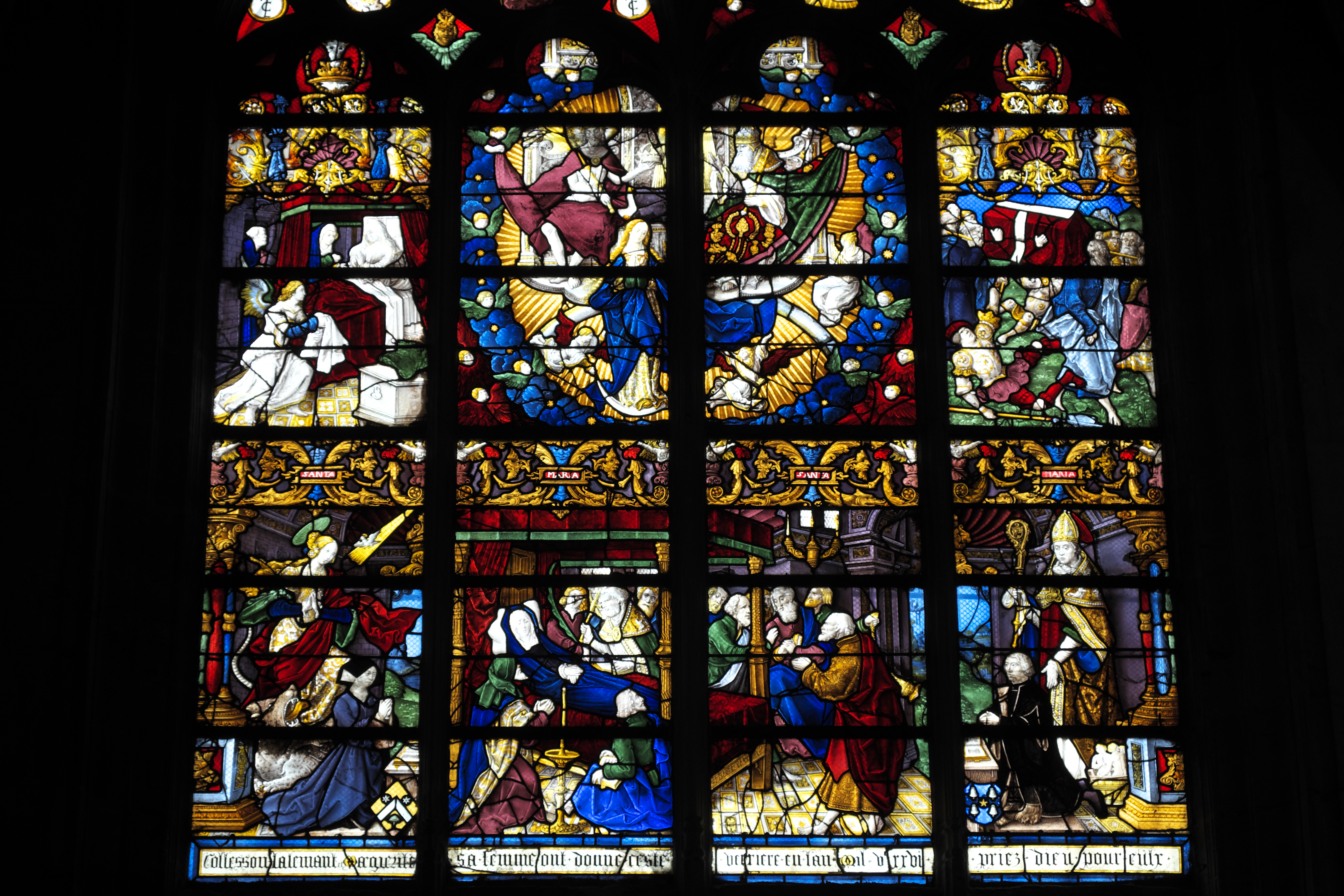 Bleiglasfenster (Baie 25) in der Stiftskirche Notre-Dame-en-Vaux in Châlons-en-Champagne im Département Marne (Champagne-Ardenne/Frankreich), ursprünglich mit der Jahreszahl 1526, Mathieu Bléville zugeschrieben; Darstellung (Ausschnitt): Verherrlichung Marias mit Szenen Marientod und Himmelfahrt